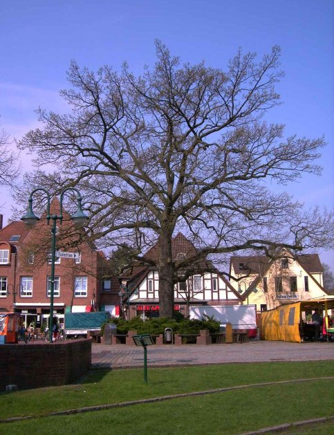 Kaiser-Wilhelm-Eiche auf dem Marktplatz in Osterholz-Scharmbeck. Photographiert im April 2005. Photograph: CWitte